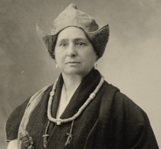 Fotograf ukjent, Reprofotografi Meyer, Elisabeth Portrett av Alexandra David-Neels, Tibet 1933. Bildetekst: Vår tids største kvinnelige oppdagelsesreisende, Alexandra David-Neels. Halskjedet er laget av 108 pannebraskstykker og på høire side sees det omtalte magiske lårben. 16 x 10,7 cm Sølvgelatin. NMFF.003380-3-1